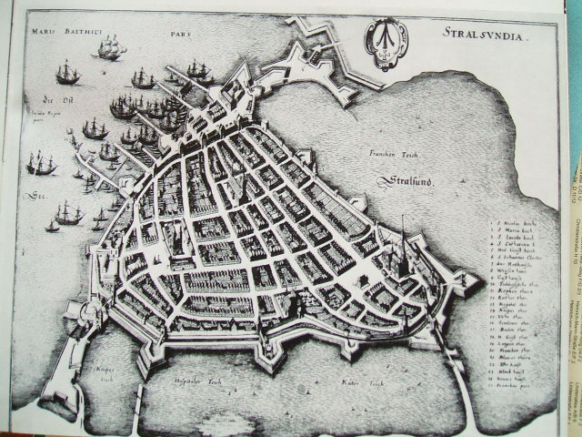 Stadtplan von 1650 (Merian)